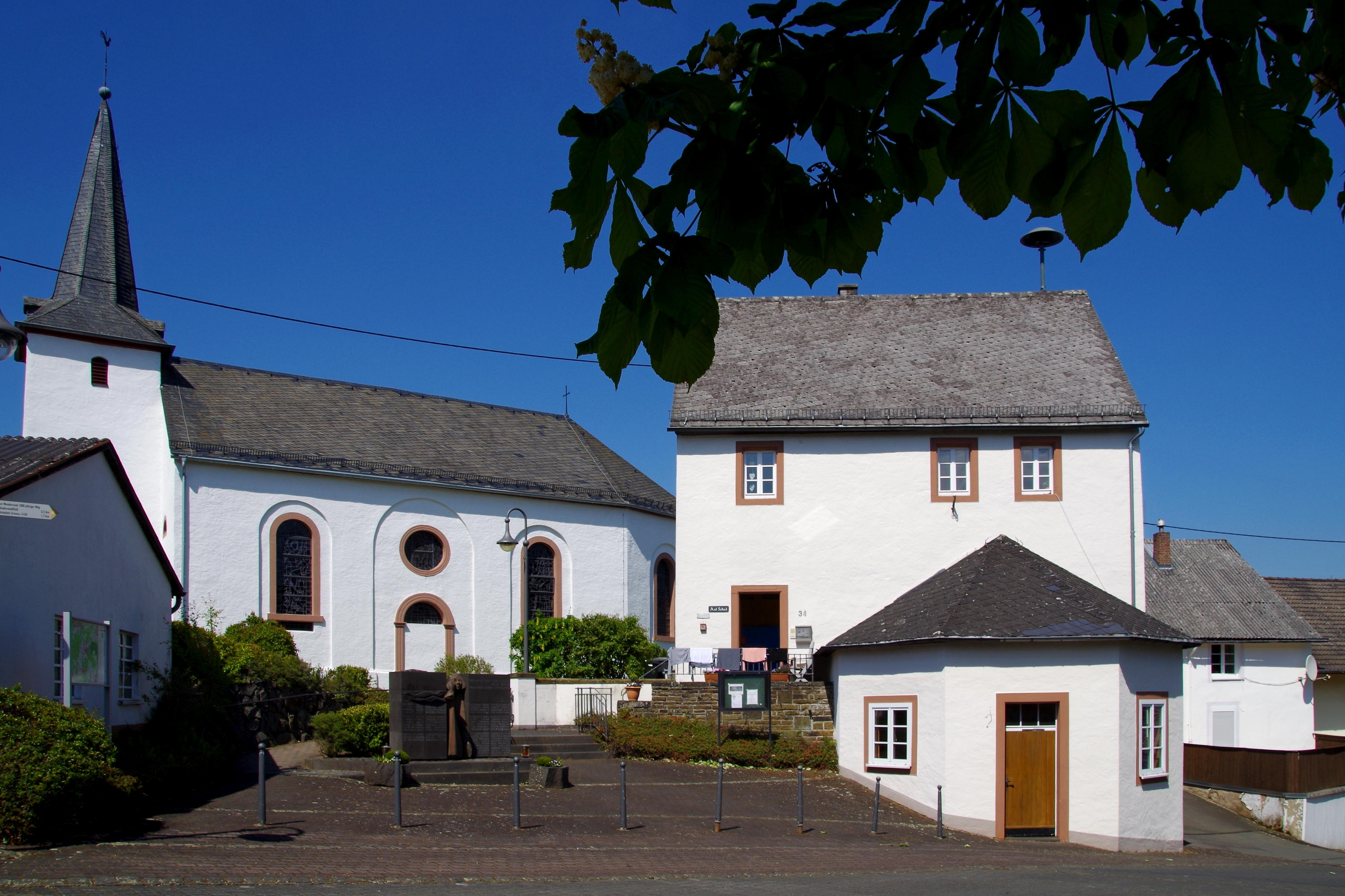 Oberstadtfeld, Ortszentrum mit St. Brigida und der alter Schule